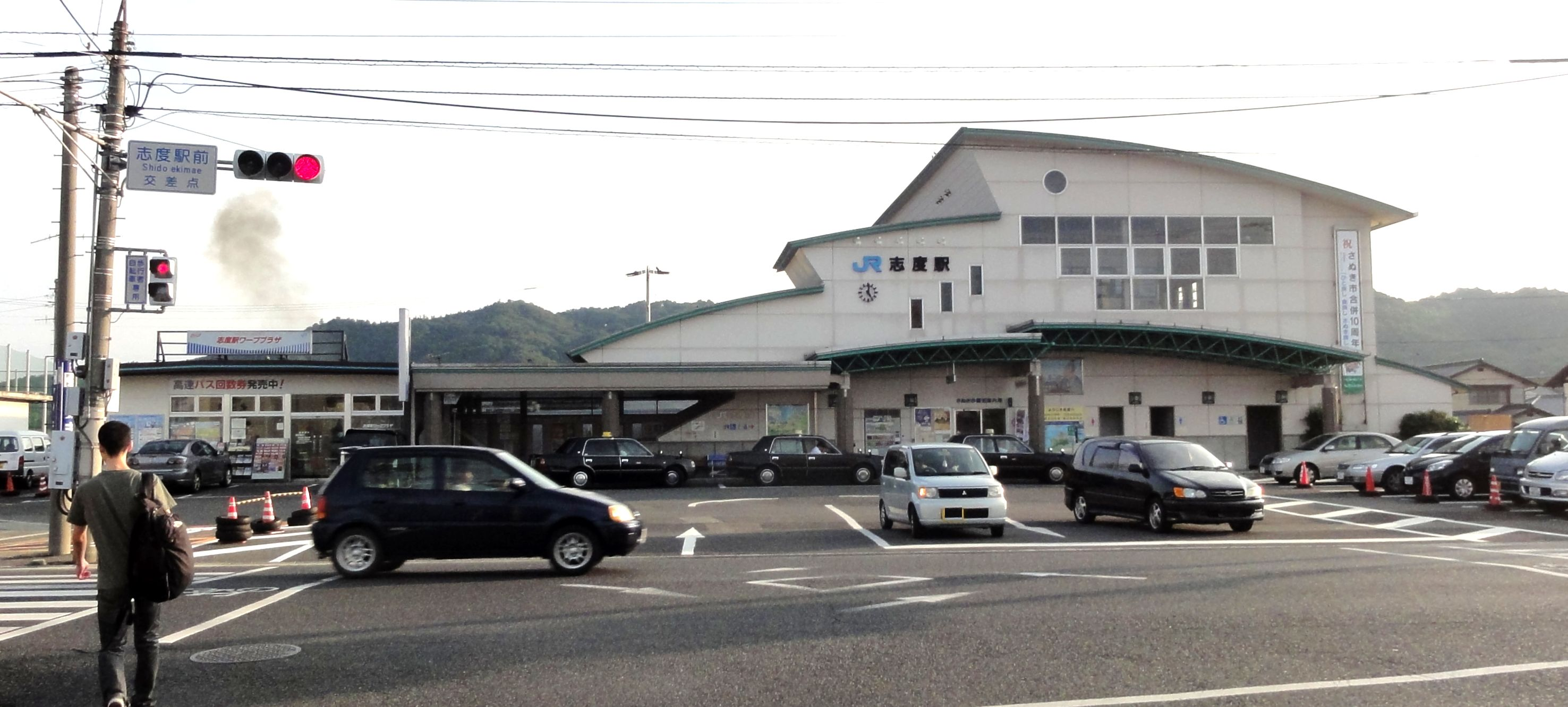 高徳線・志度駅